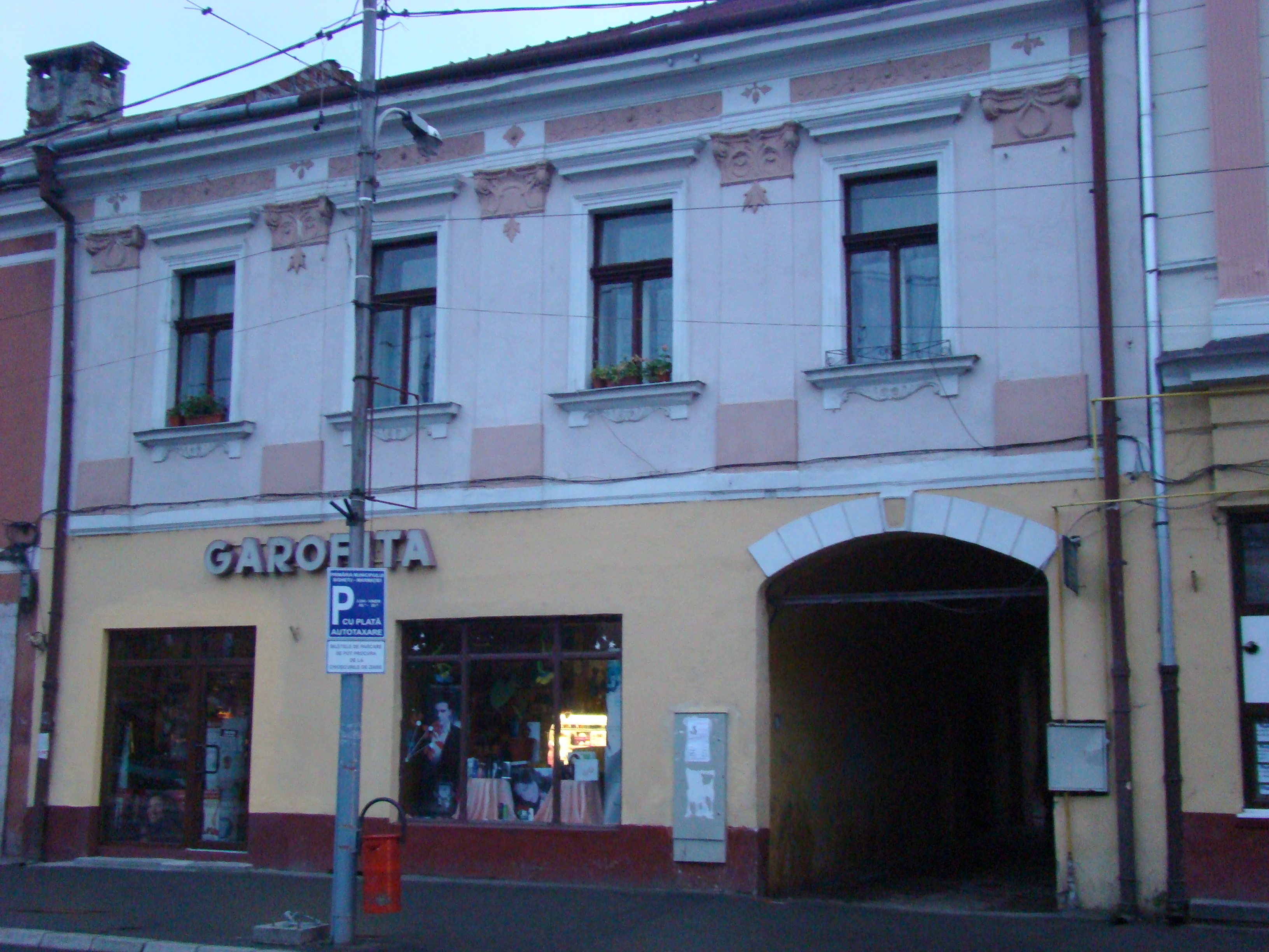 Casă, municipiul Sighetu Marmației, Piața Libertății 6